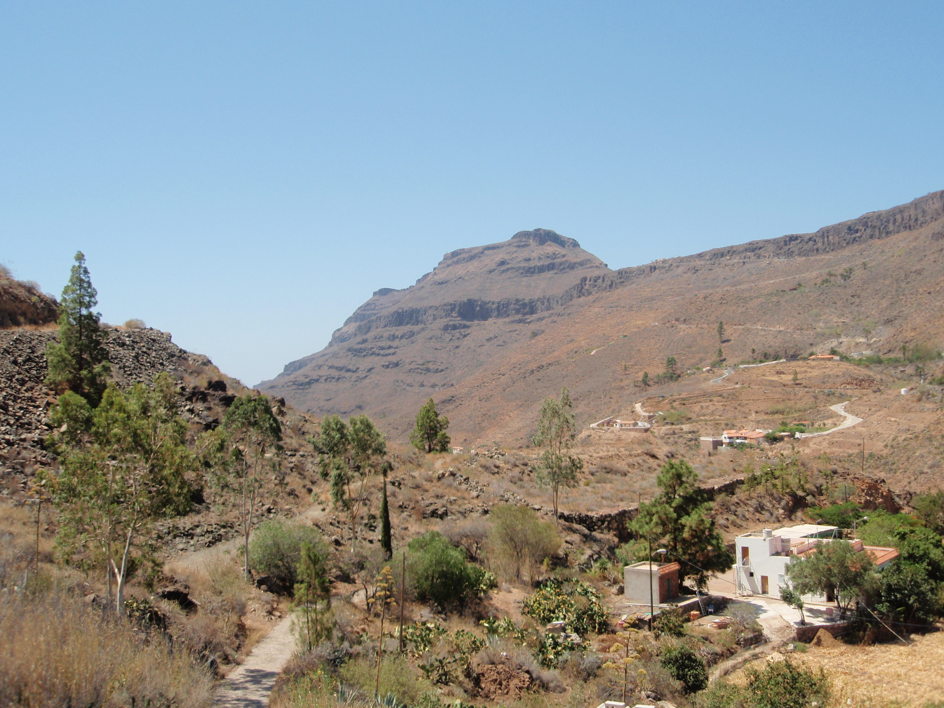 Montañas alrededor de Ayagaures, San Bartolomé de Tirajana, Gran Canaria